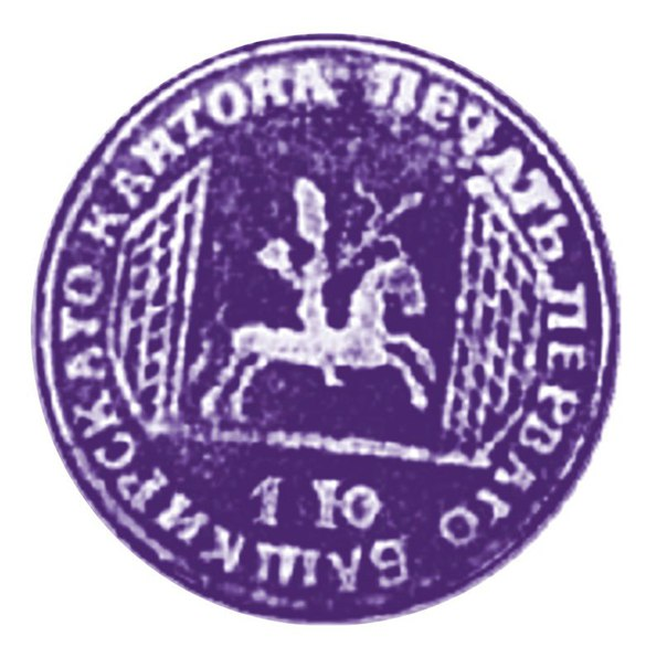 Печать 1-го башкирского кантона (гайнинские башкиры)